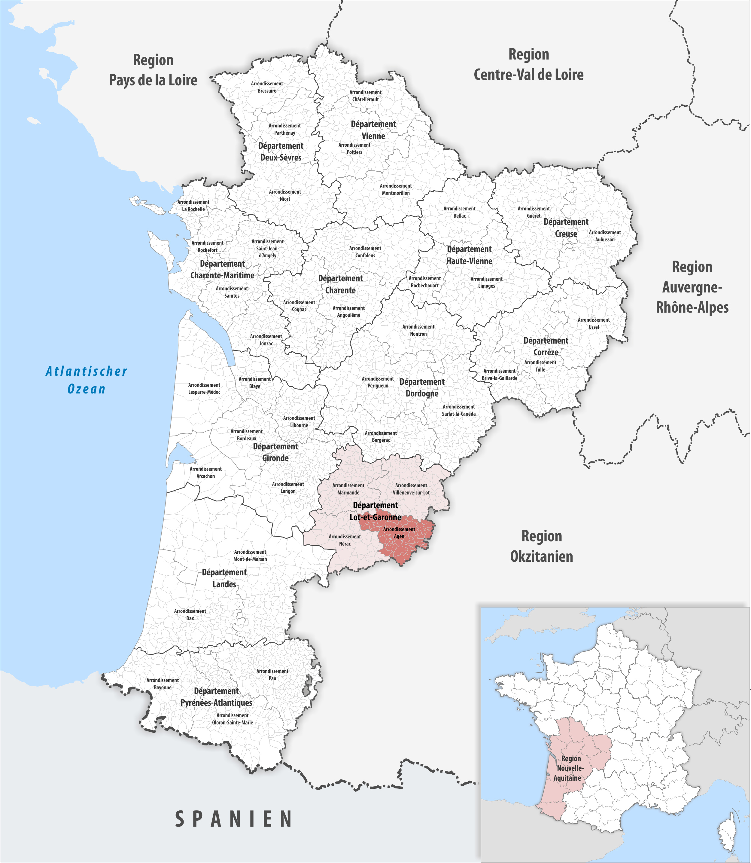 Lage des Arrondissements Agen